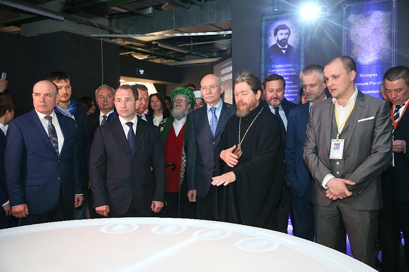 Открытие исторического парка «Россия – моя история» в Уфе